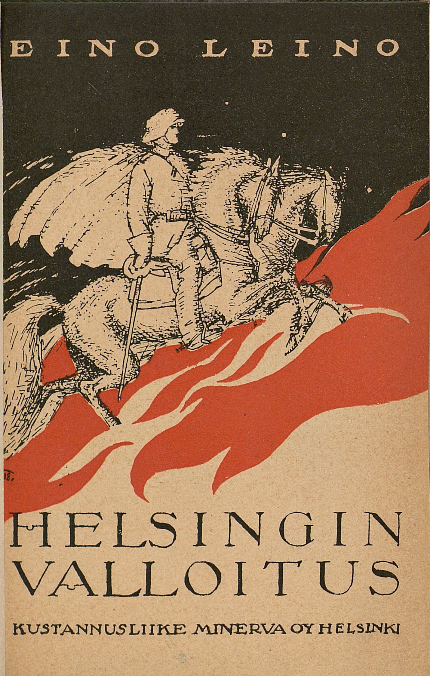 Kirjan Helsingin valloitus (1918) kansi